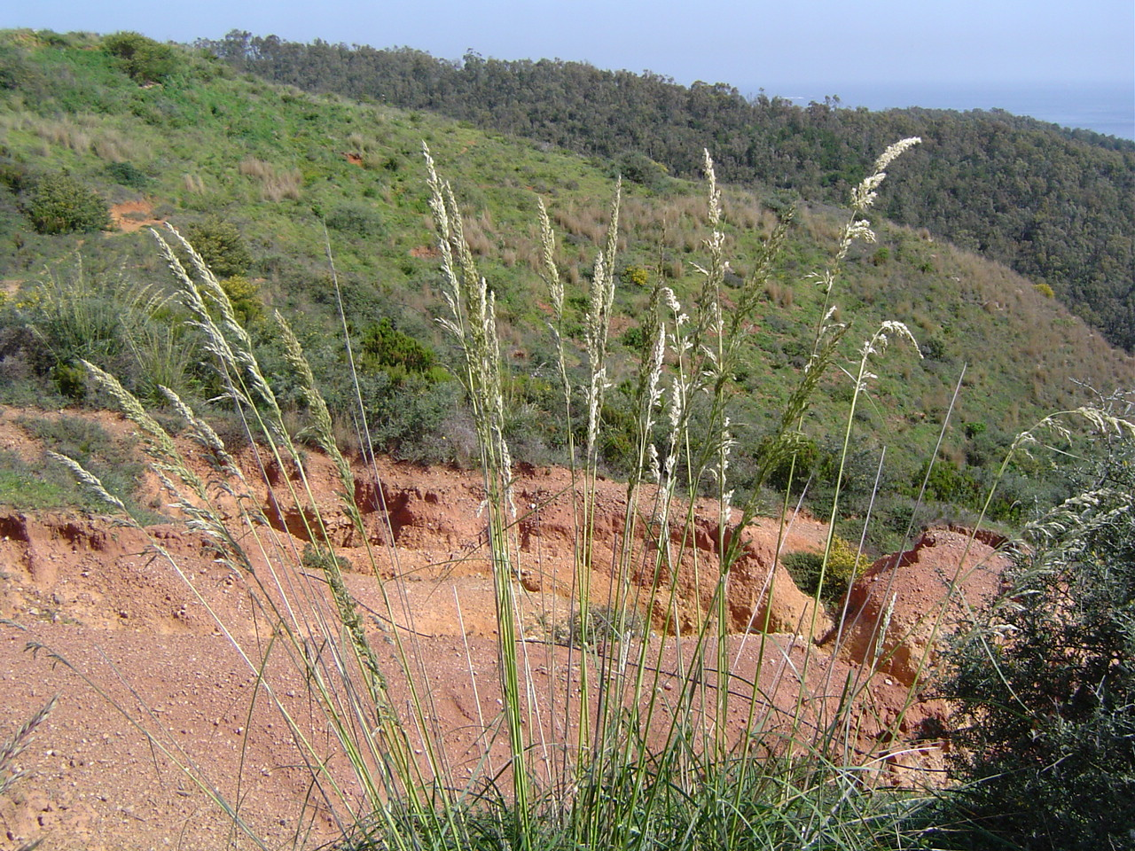 Ampelodesmos mauritanica (Poiret) T.Durand & Schinz, Ceuta, España